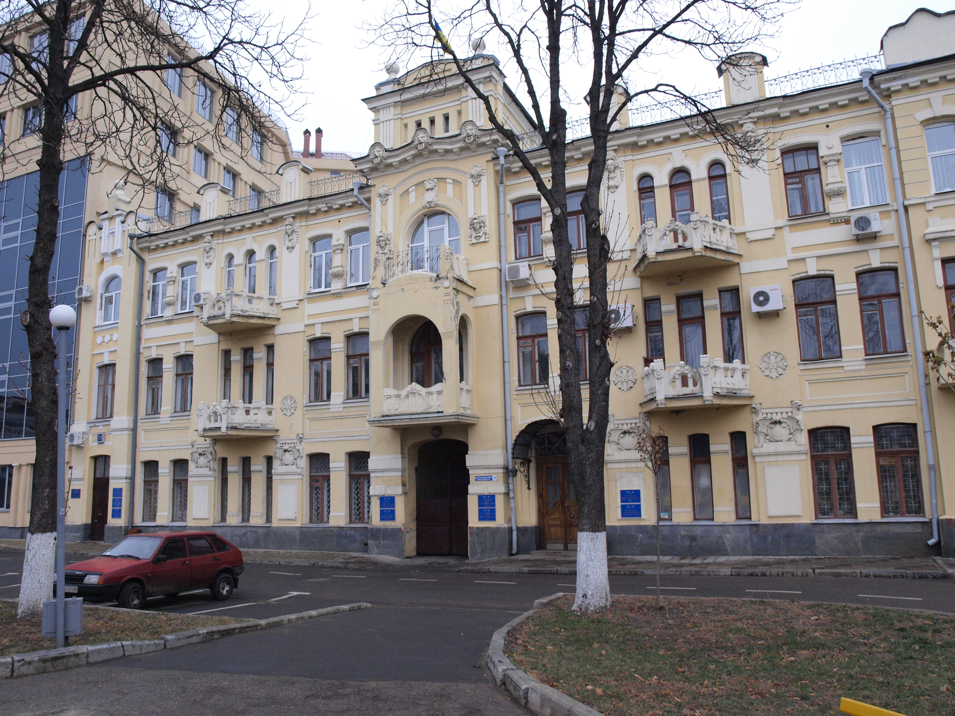 Житловий будинок, Харків, вул. Полтавський Шлях, 11